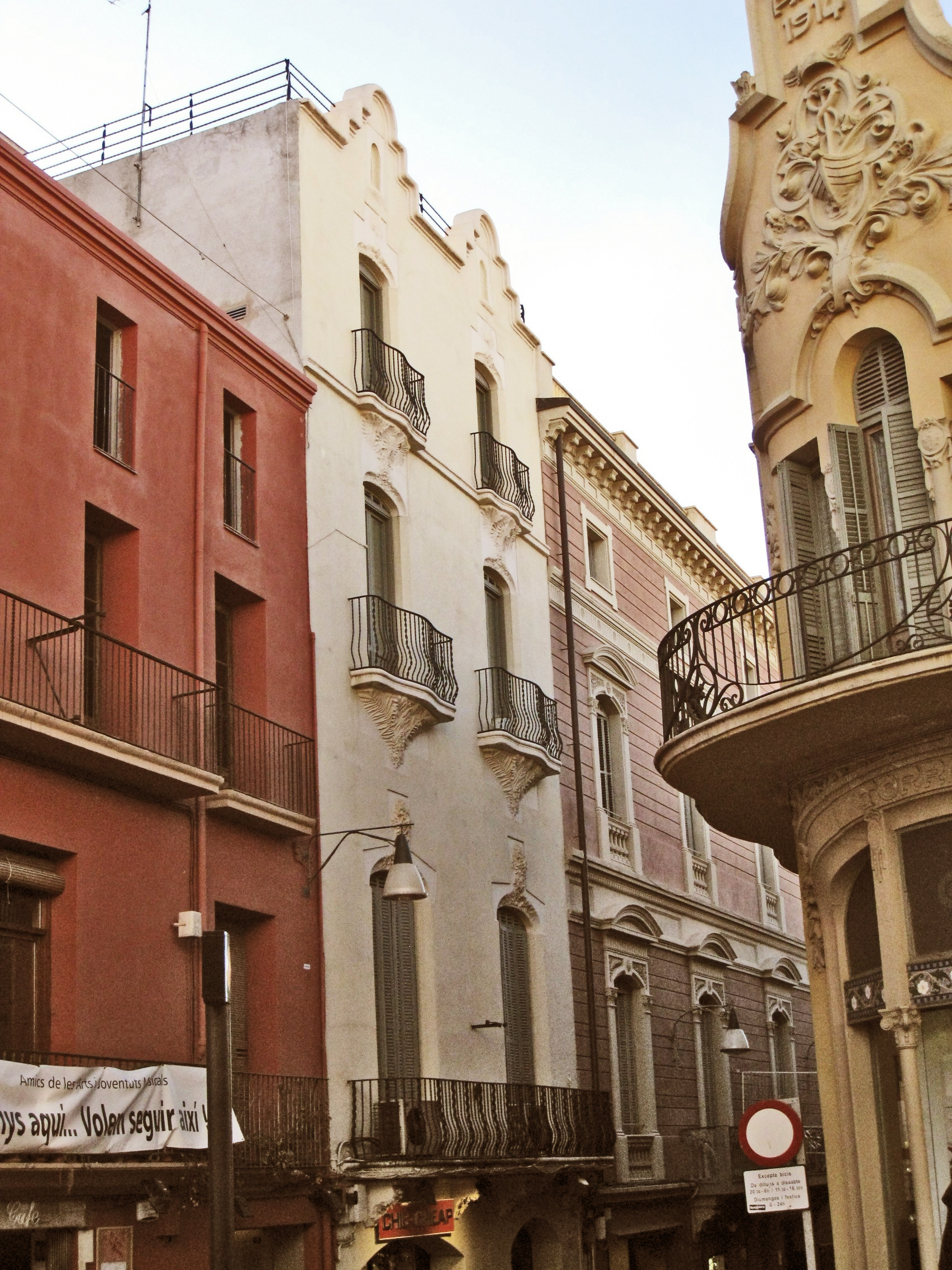 Antic Hotel Peninsular, conegut popularment com l'Hotel Pompidor, obra de Lluís Muncunill de 1903, al carrer de Sant Pere núm. 52 (Terrassa). És l'edifici més alt, de la façana blanca; a la dreta hi ha l'antic Círcol Egarenc, i al davant, a l'altra banda de carrer, Cal Sastre d'Olesa.